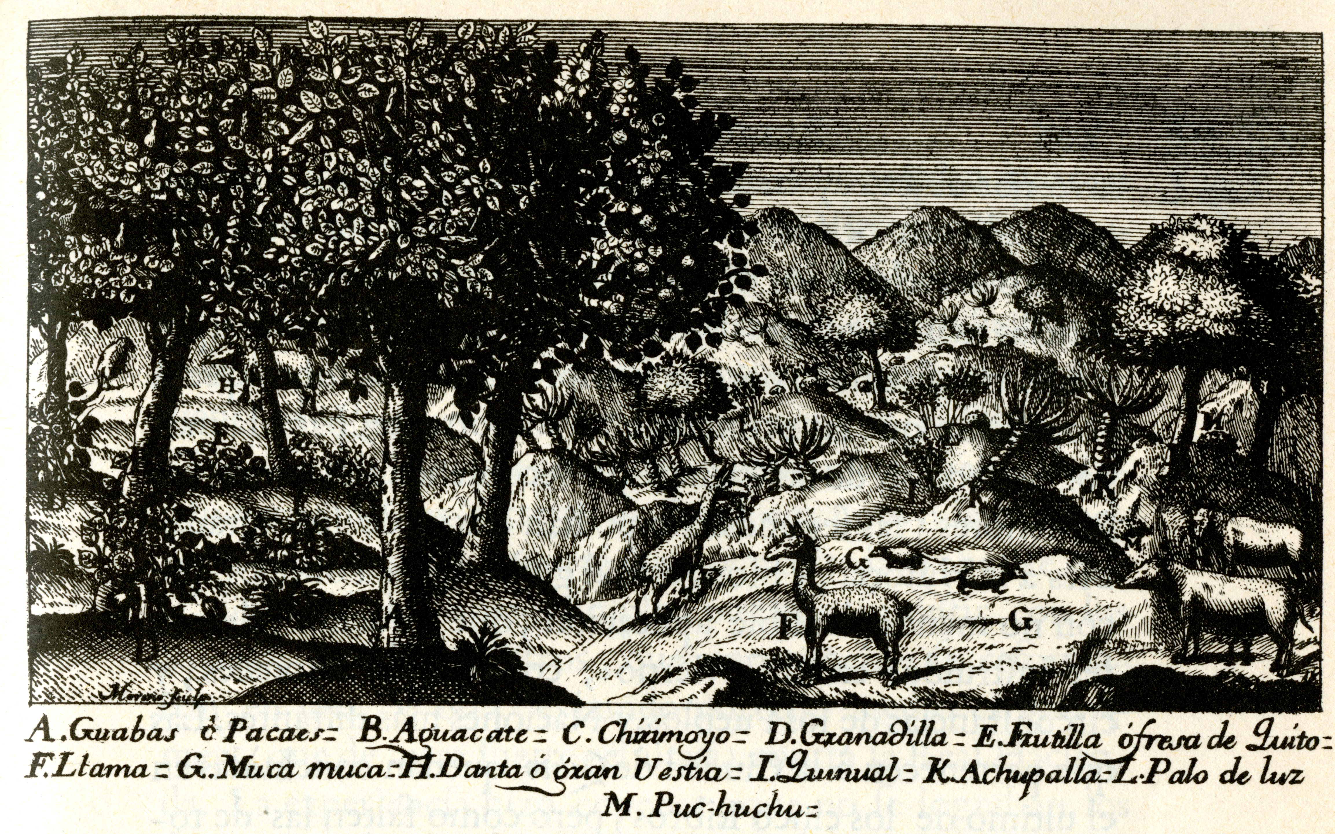 De Ulloa, Antonio y Jorge Juan. Relación Histórica del Viaje a la América Meridional, hecho de Orden de Su Majestad Católica para medir algunos Grados de Meridiano Terrestre, y venir por ellos en conocimiento de la verdadera Figura y Magnitud de la Tierra, con otras varias Observaciones Astronómicas y Físicas. Por Don Jorge Juan Comendador de Aliaga, en la Orden de San Juan, Socio correspondiente de la Real Academia de las Ciencias de París; y Don Antonio de Ulloa de la Real Sociedad de Londres: ambos por Capitanes de Fragata de la Real Armada. Primera Parte / Tomo I. Impresa por la Orden del Rey Nuestro Señor en Madrid por Antonio Marín, Año de MCDDXLVIII (1748). Diapositiva de Consulta y acceso publico cuya información fue investigada de un libro y/o ejemplar de revisión custodiado en los Fondos Bibliográficos (Sección Siglo XVIII o Etapa Colonial) del Archivo Histórico del Guayas; Guayaquil, Ecuador.Compartido y consultado usuario J. Javier García A.